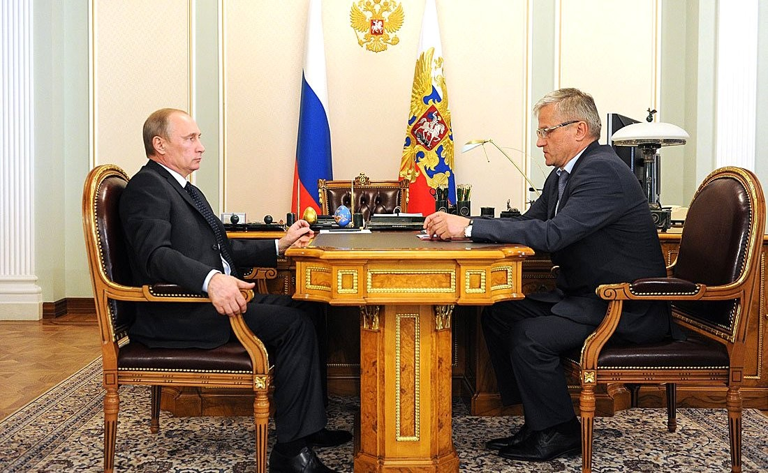 Встреча с ректором Первого Санкт-Петербургского государственного медицинского университета Сергеем Багненко